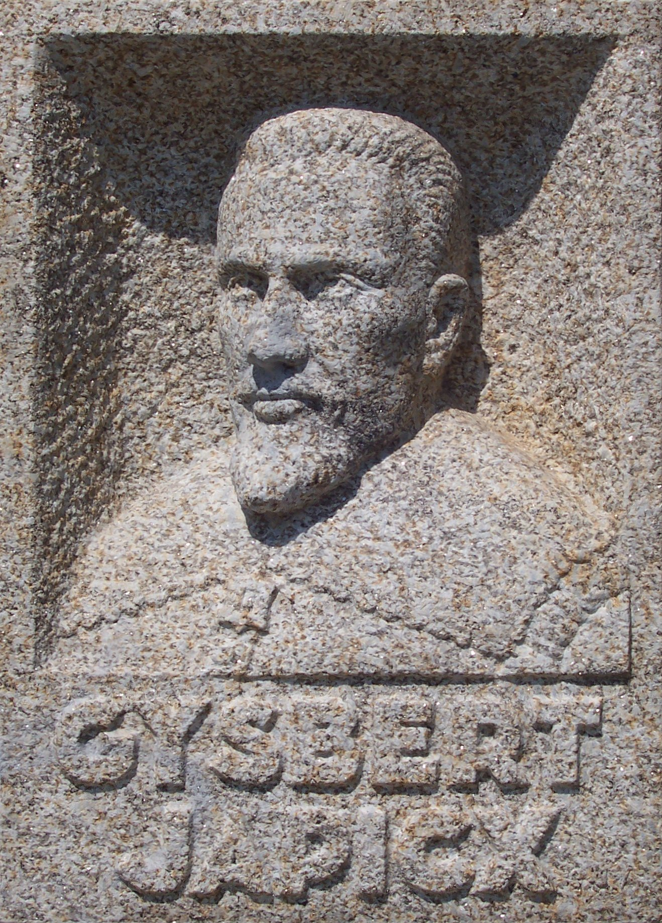 Boalsert: tinkstien oan Gysbert Japicx